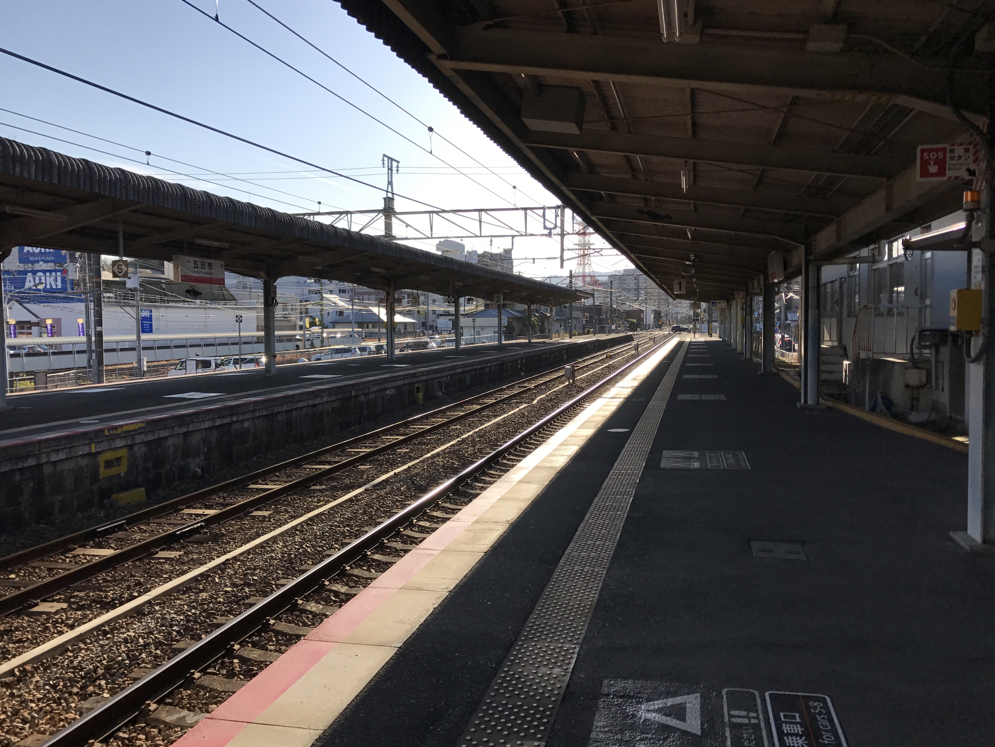 五日市駅のホーム(奥は廿日市方面)